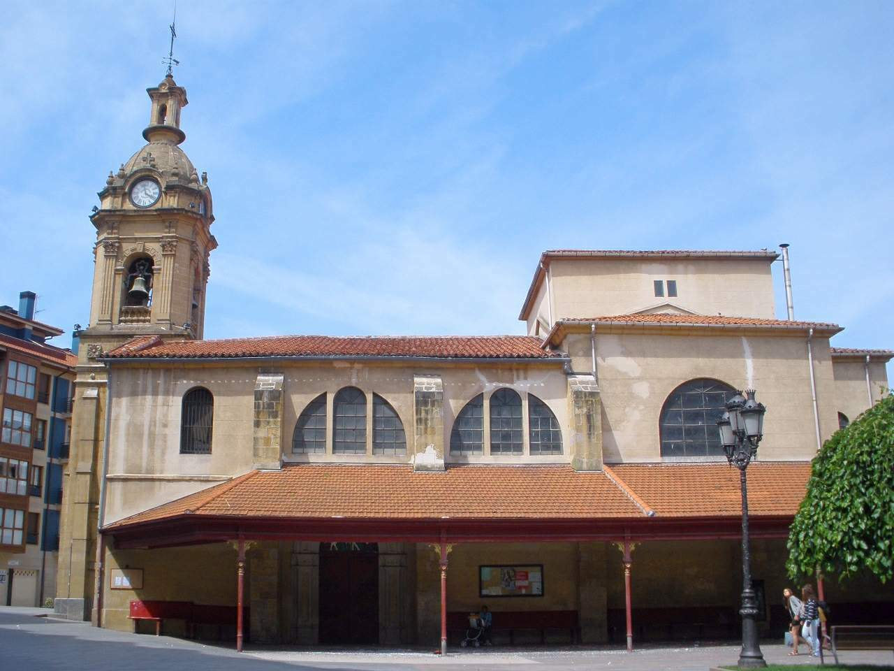 Iglesia de San Jorge (Santurtzi, Bizkaia)